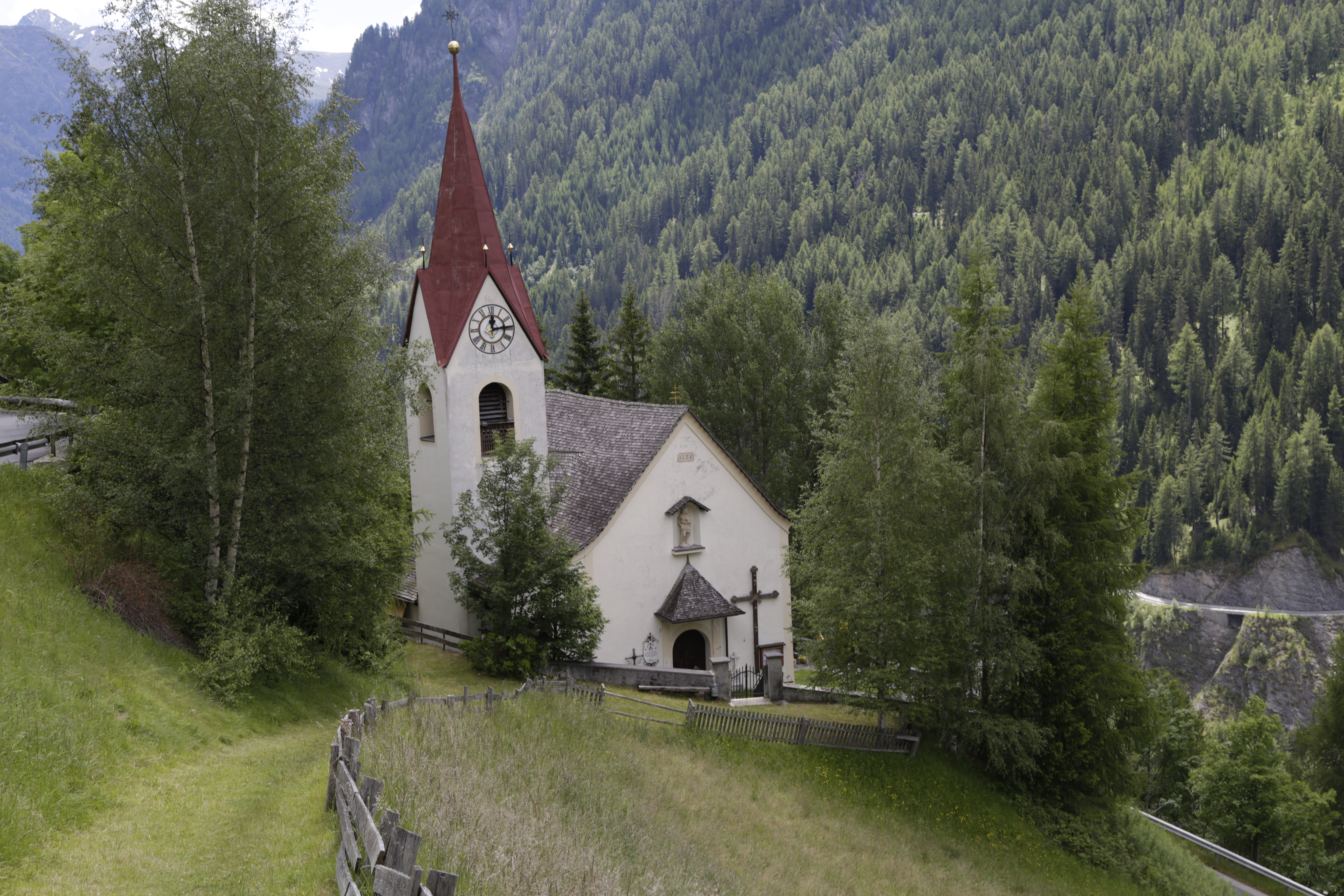 Die römisch-katholische Expositurkirche Spiss ist dem Heiligen Johannes der Täufer geweiht, und ist denkmalgeschützt.